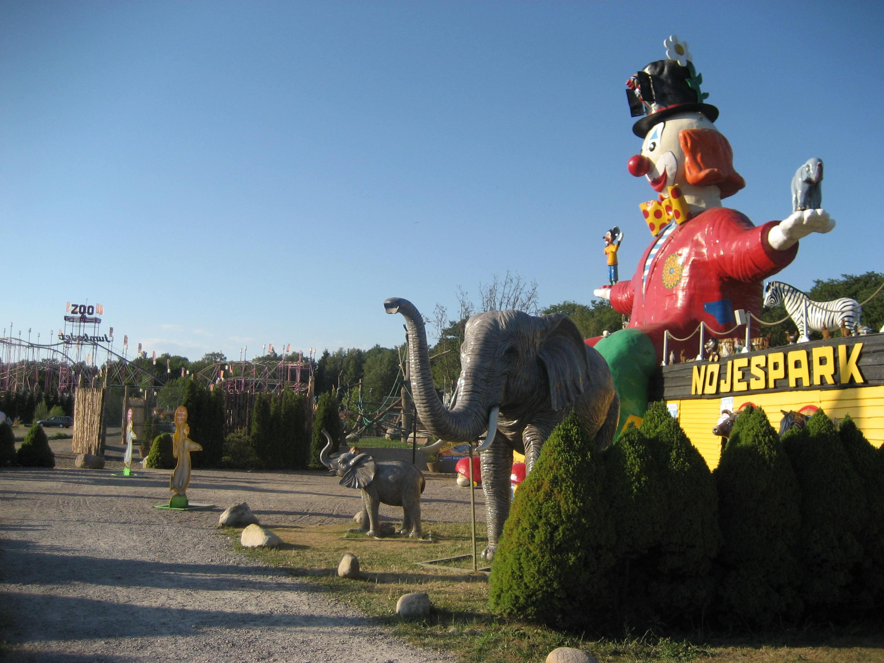 Ölands djurpark